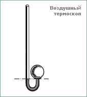 გალილეო გალილეის ჰაერის თერმოსკოპი